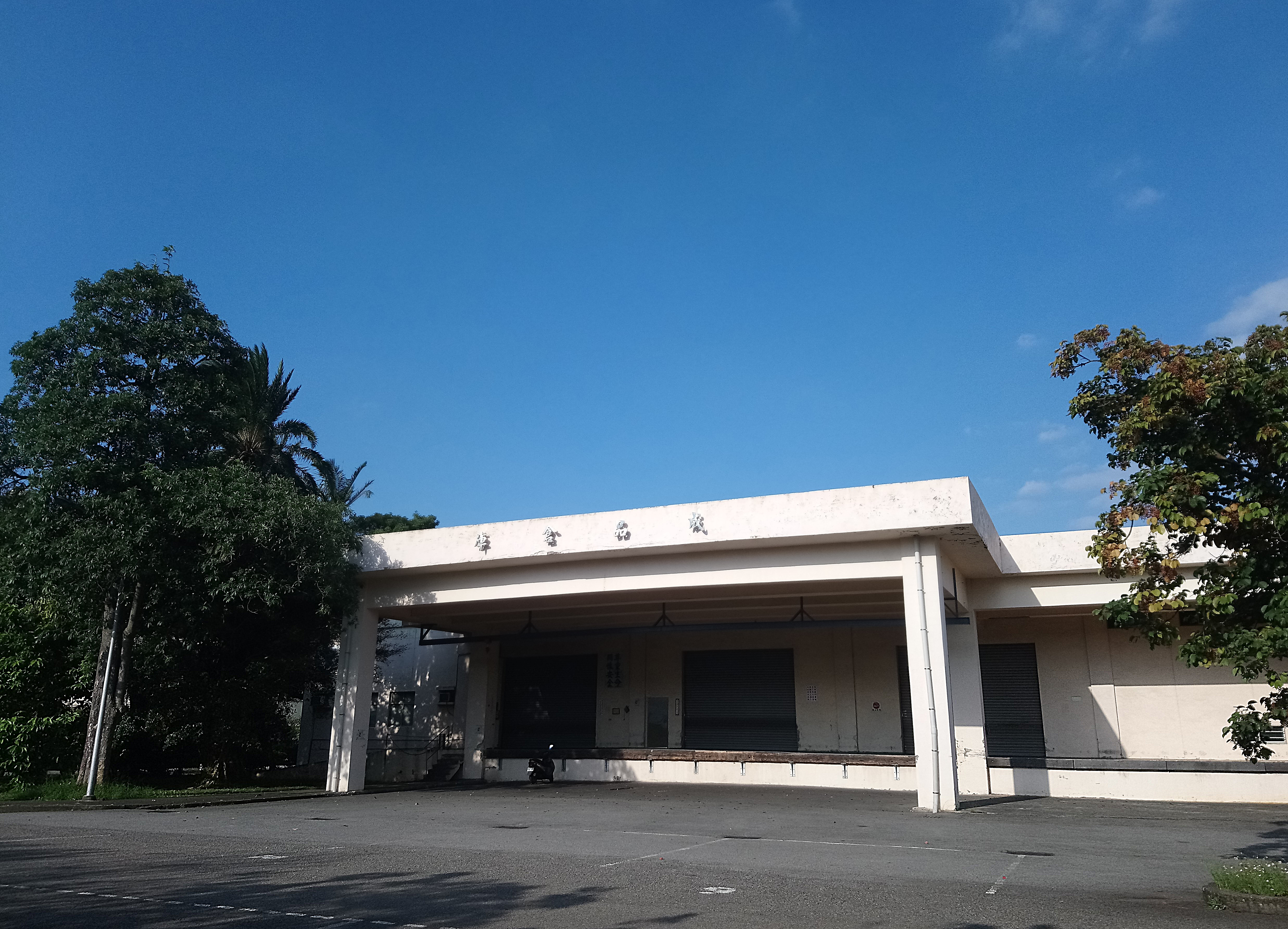 臺灣菸酒股份有限公司桃園酒廠成品倉庫,桃園市龜山區樂善里